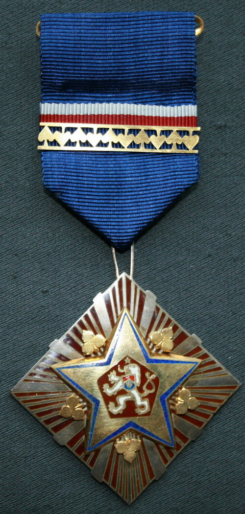 Орден Республики (ЧССР)